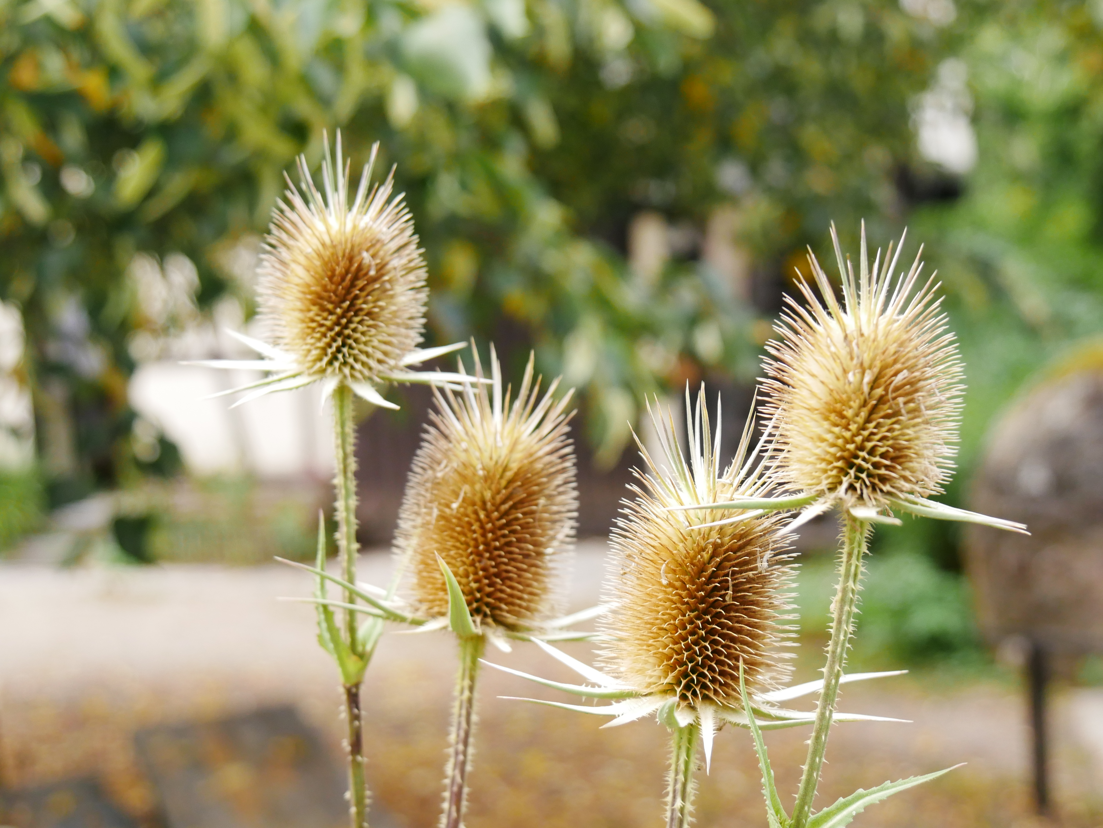 Schlitzblatt Karde (Dipsacus laciniatus) im Freilichtmuseum Roscheiderhof. Standort: Selbstangesiedelt im Beerengarten links vor der Stallscheune und zwischen den Pflastersteinen vor der Stallscheune.